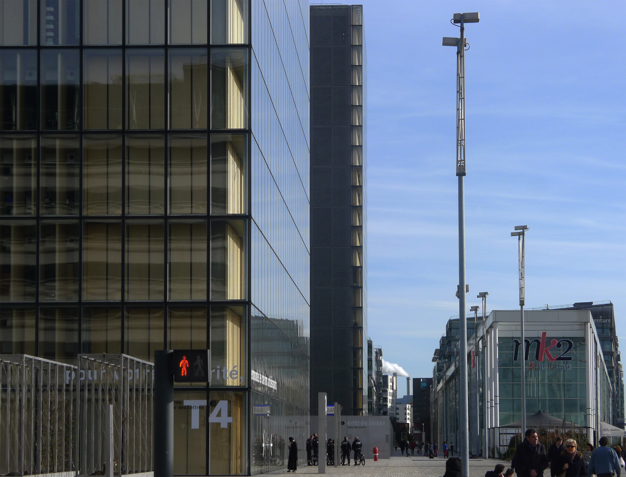 Avenue de France (au niveau de la BNF François-Mitterand)- Paris XIII